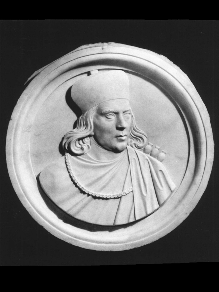 Medaglione che ritrae Nicolo Zeno, opera di Antonio Bianchi (1858-1861). Il medaglione fa parte del Panteon Veneto, conservato presso Palazzo Loredan di Campo Santo Stefano a Venezia.